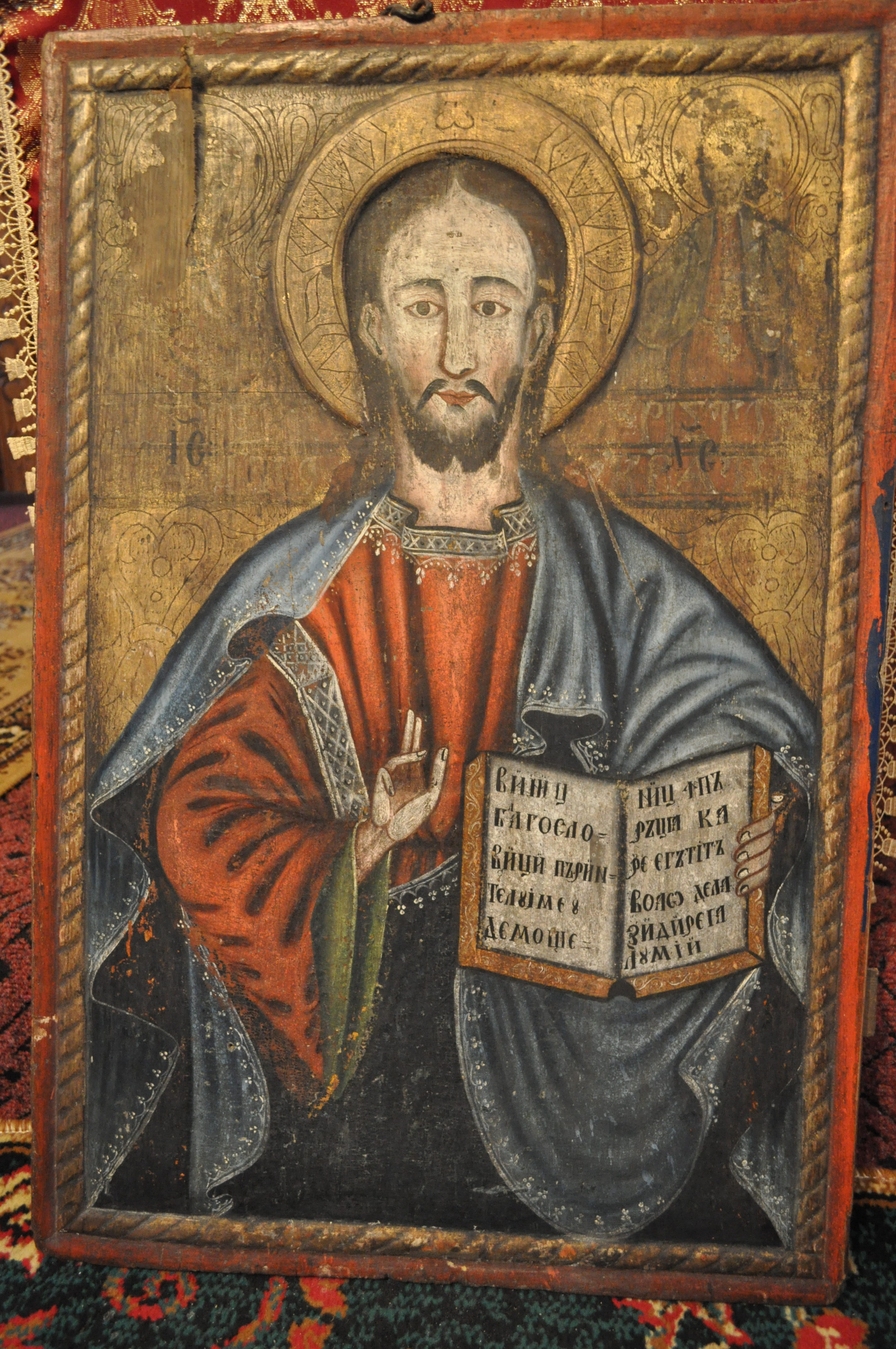 Biserica de lemn "Sfântul Petru" din Mureșenii de Câmpie